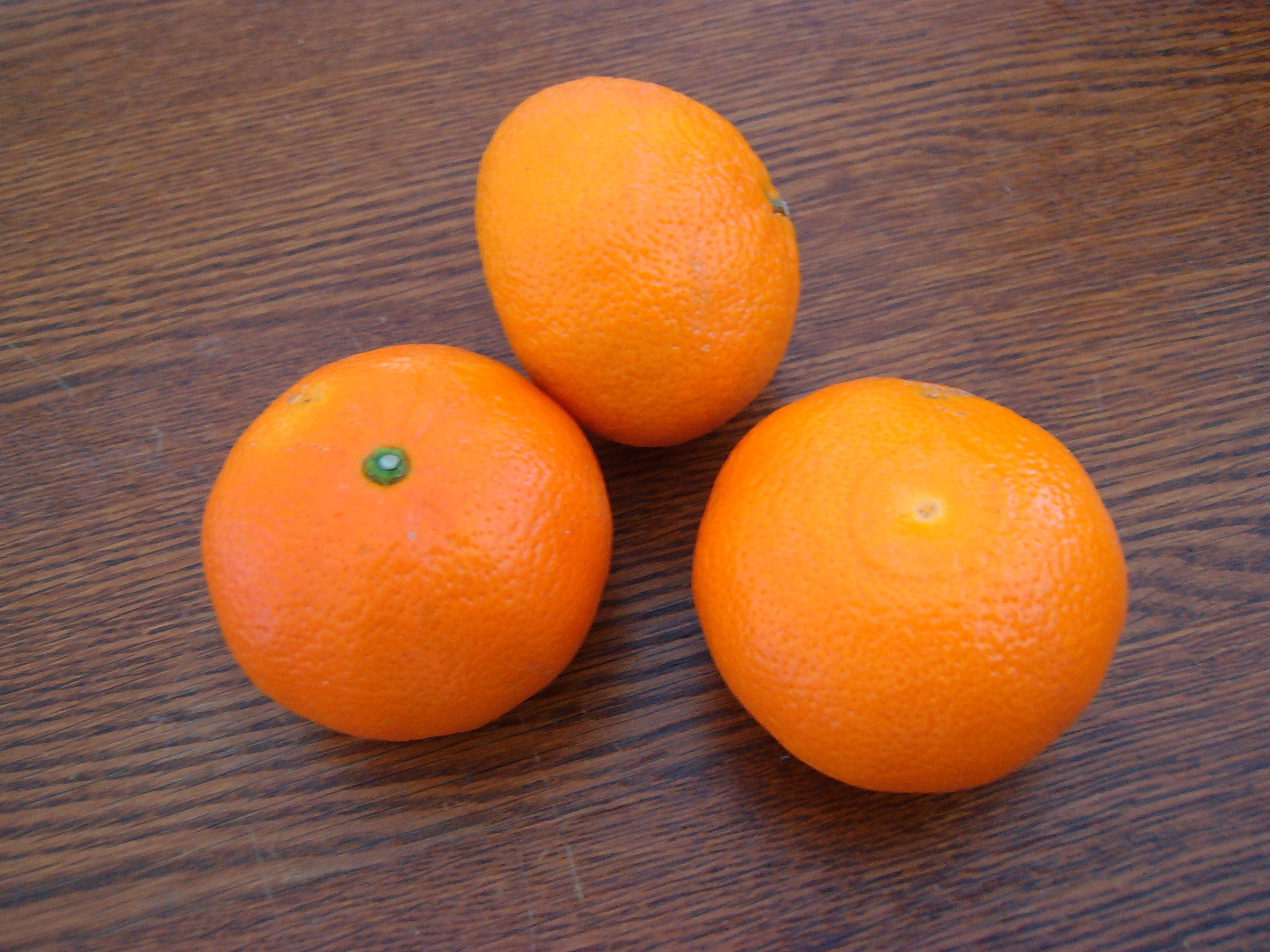 photo de l'ortanique